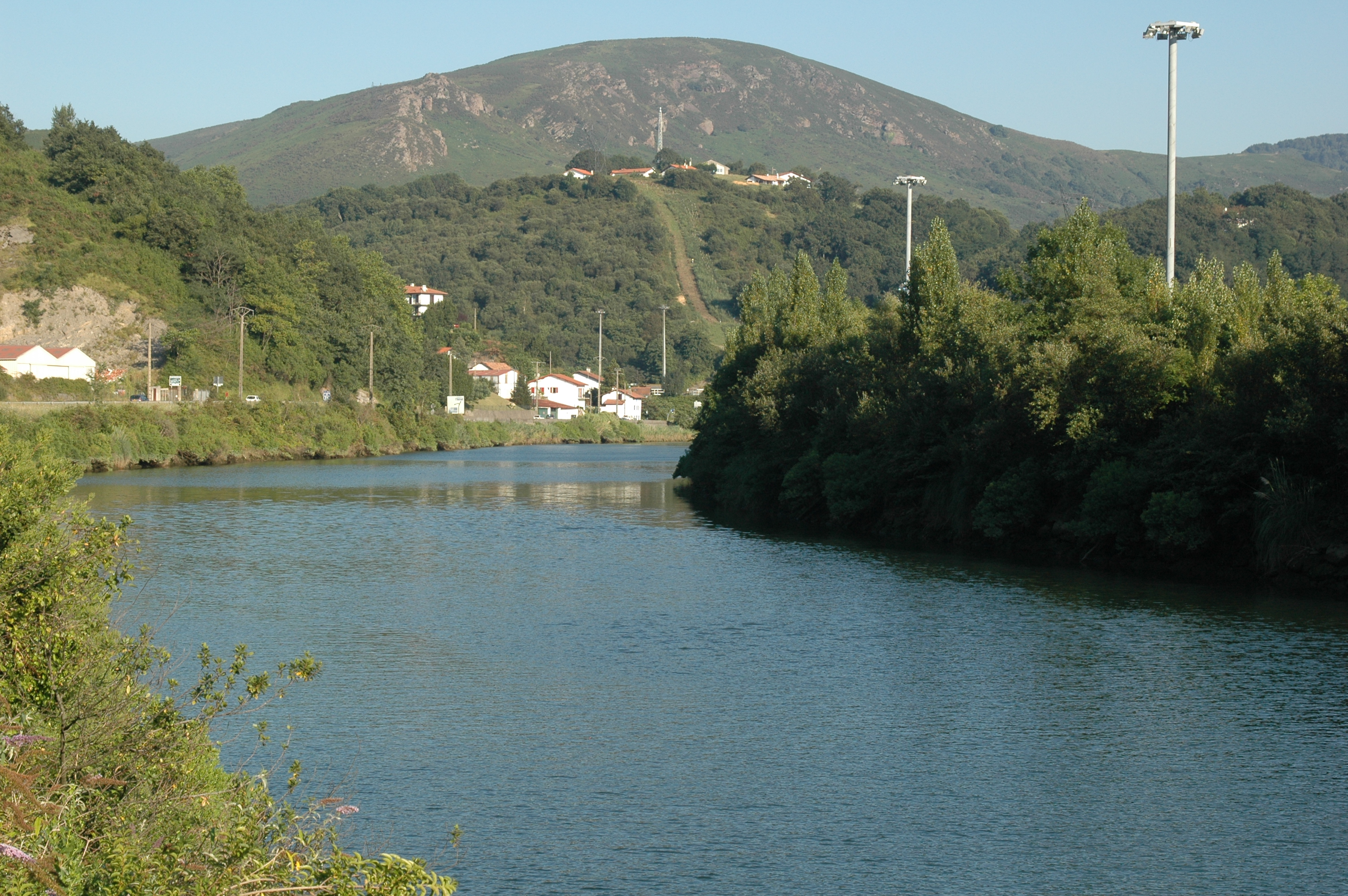 La Bidassoa, vue vers l'amont depuis la D811 près de la redoute Louis XIV. La commune de Biriatou est à gauche (en rive droite) de la Bidassoa (le village lui-même est derrière nous) ; l'Espagne est à droite (en rive gauche). Le hameau d'Aruntz et son pylône sont sur la première hauteur à mi-plan ; ce qui semble être un chemin menant tout droit vers ce sommet, est le passage de lignes à haute tension. La barre rocheuse du Lumaberde est légèrement sur sa gauche (derrière ce sommet), et plus loin derrière le mont du Calvaire (277 m alt.). Le pont de Bénobie, sur le territoire d'Urrugne, est à environ 580 m derrière nous. Le pont de l'autoroute A63 est devant nous, juste après le coude de la rivière.